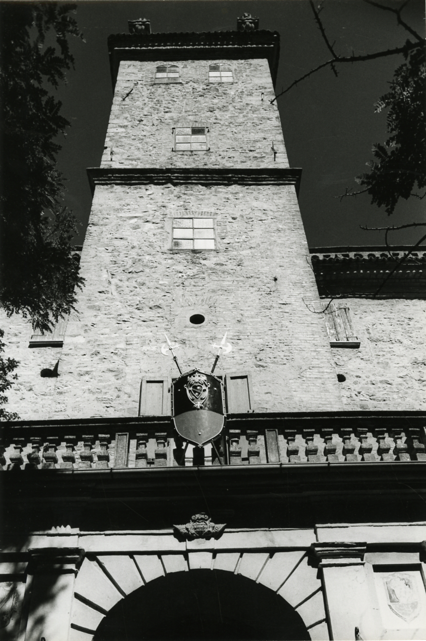 Servizio fotografico : Ziano Piacentino, 1981 / Paolo Monti. - Stampe: 7 : Positivo b/n, gelatina bromuro d'argento/ carta, 24x30. - ((Al verso delle stampe manoscritti i numeri dei negativi corrispondenti: 89/2, 89/4, 89/5, 89/10, 89/13, 89/33, 3689/37. Sul coperchio della scatola, manoscritto a pennarello: "Città Storiche/ Piacenza". - Occasione: Documentazione di antiche ville nel territorio (secondo accordi con il Signor Tirotti). - Fonte: Fattura di Paolo Monti: IV. Commesse/ Fattura n. 44/ Riprese fotografiche antiche ville nel territorio di Piacenza (1981/12/30), presso Archivio Paolo Monti. N. 140 riprese stampate in formato 24x30